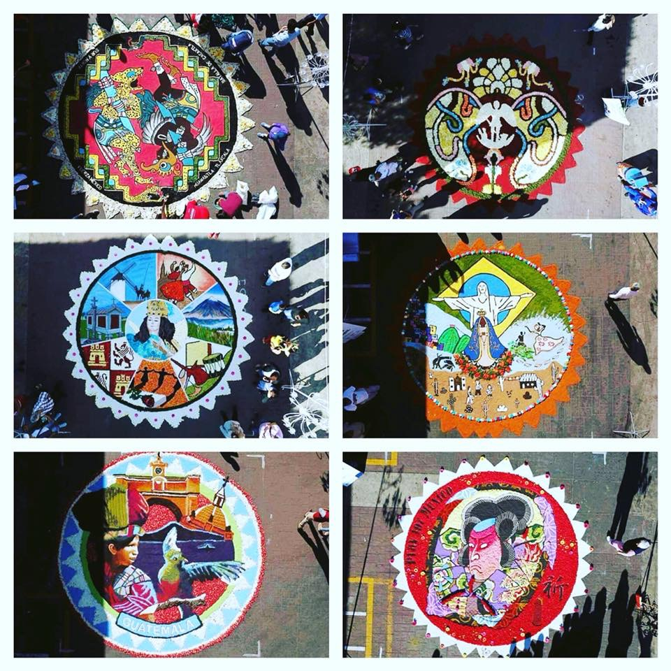 Uriangato Gto.